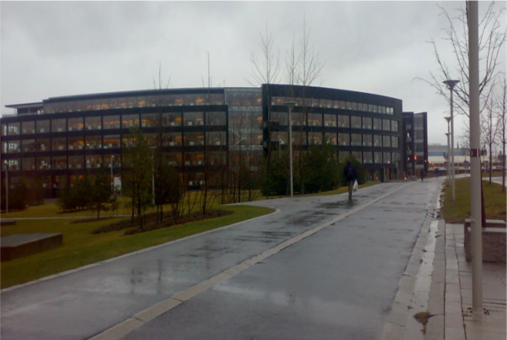 Aker Kvaerner Kværner, Fornebu, Norway